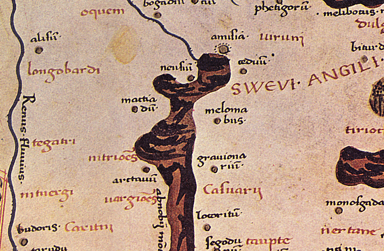 Die Ortsbezeichnung "ALISO" (hier: alisu), Detailbild von der Karte zur Germania magna.